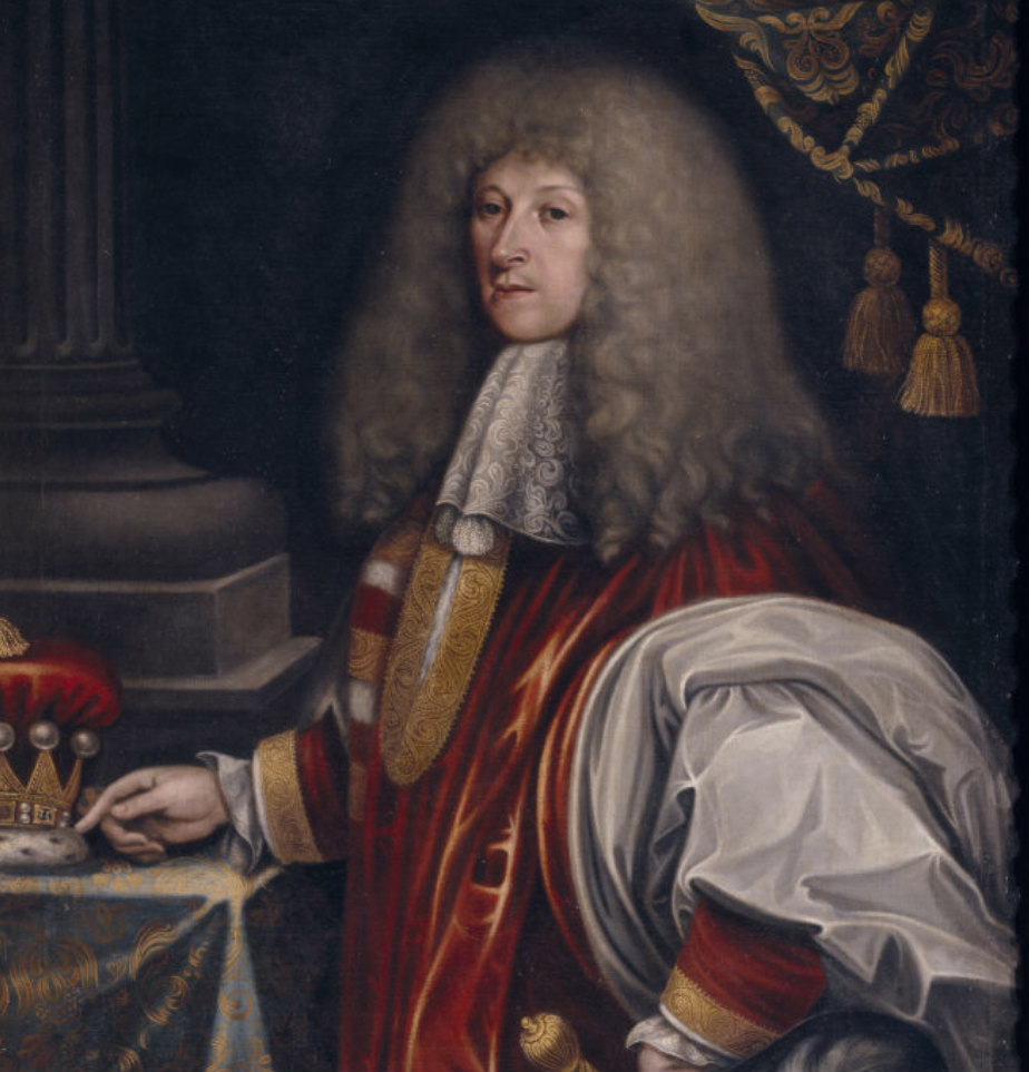 Lord Montagu